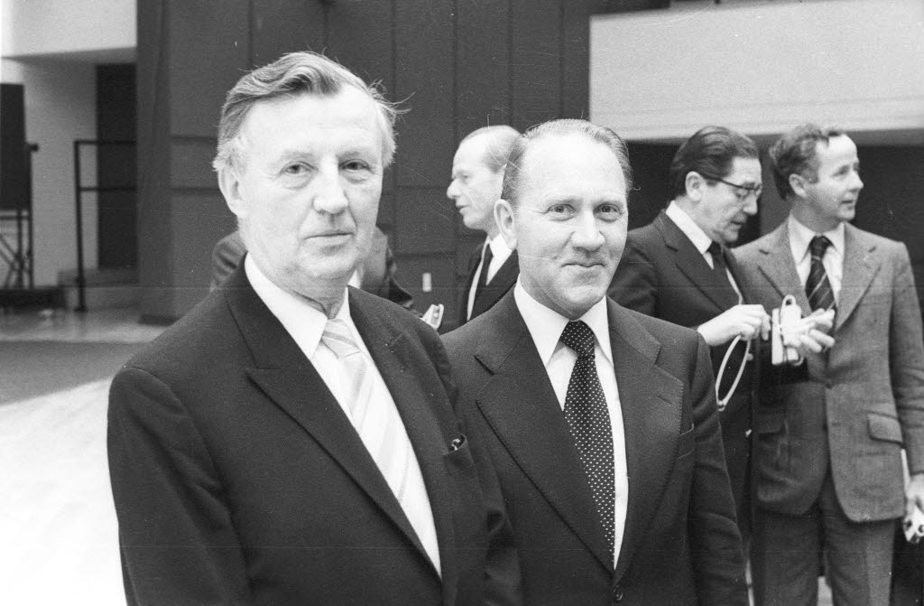 Prähistoriker vom Landesamt für Bodendenkmalpflege in Schleswig Prof. Dr. Karl Kersten (1.v.l.) und der langjährige Vorsitzende des Volksbildungsausschusses im Landtag und Lübecker Schulsenator Heinz Lund (3.v.l.) werden mit der Universitätsmedaille ausgezeichnet.